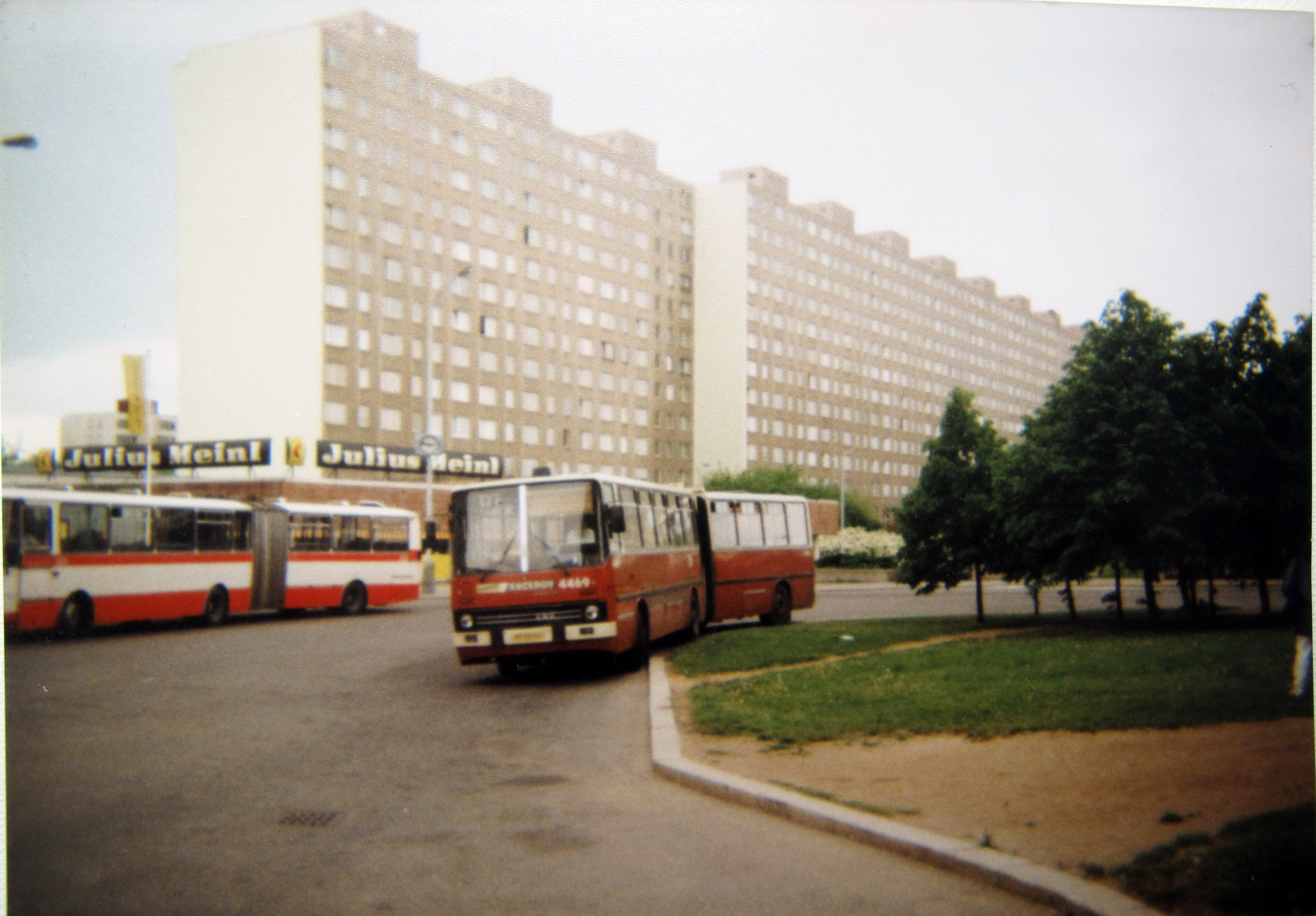 Ikarus na konečné linky 177